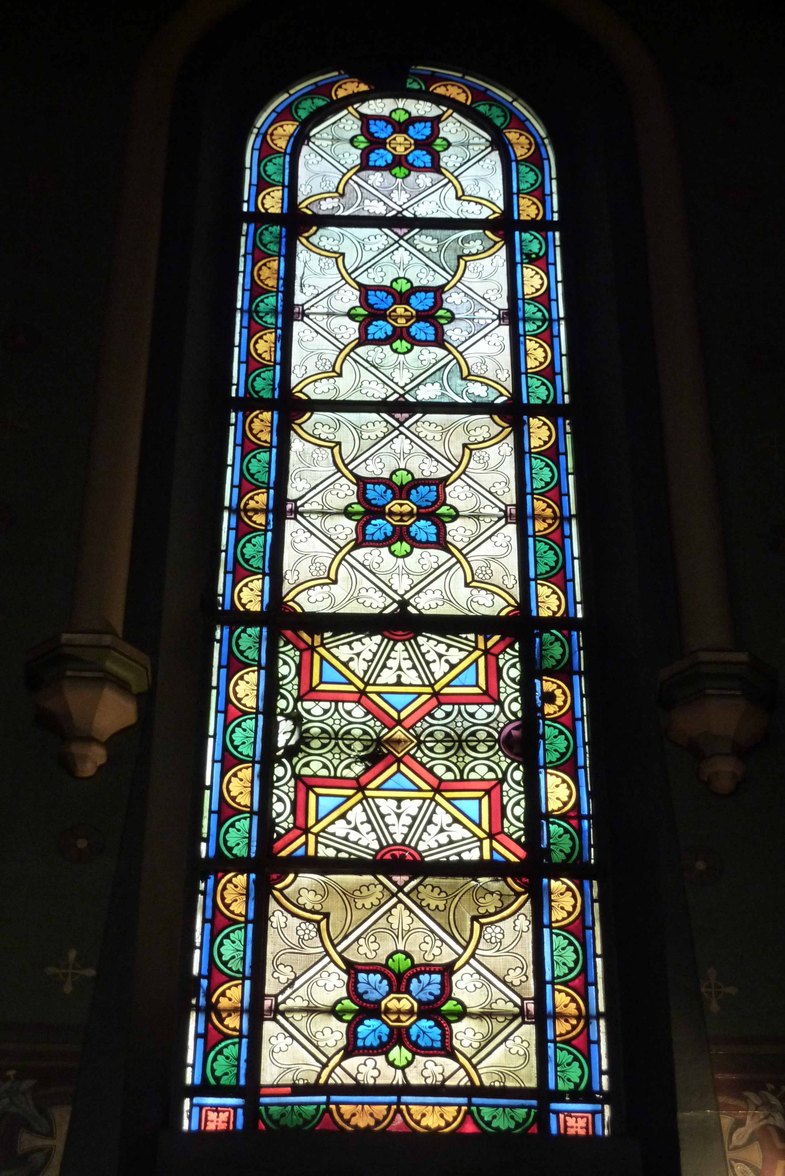 Bleiglasfenster in der "Chapelle de la Sainte Vierge" der Kirche Notre-Dame de Clignancourt von Paris, Darstellung: Ornament